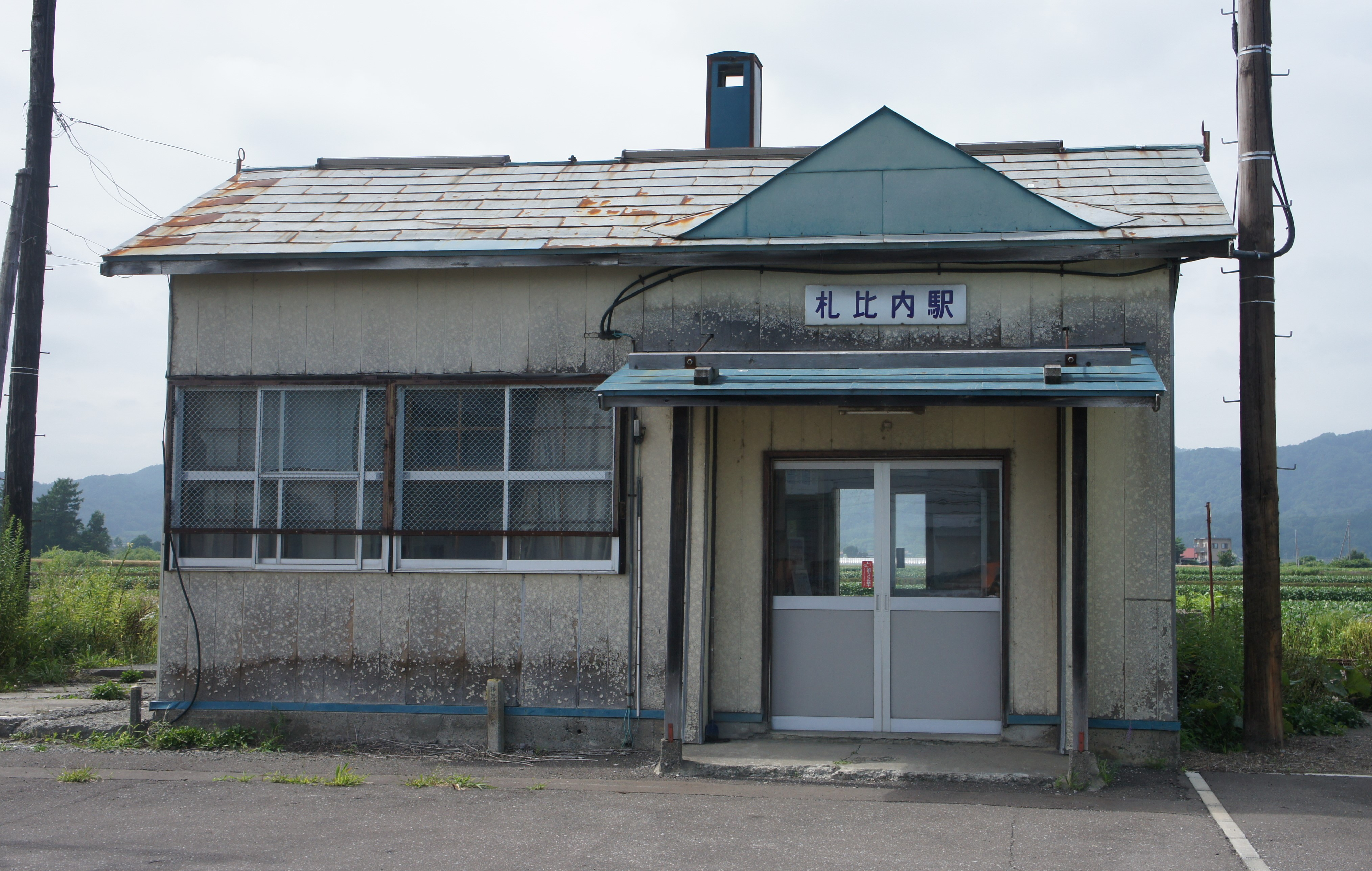 JR札沼線・札比内駅の駅舎